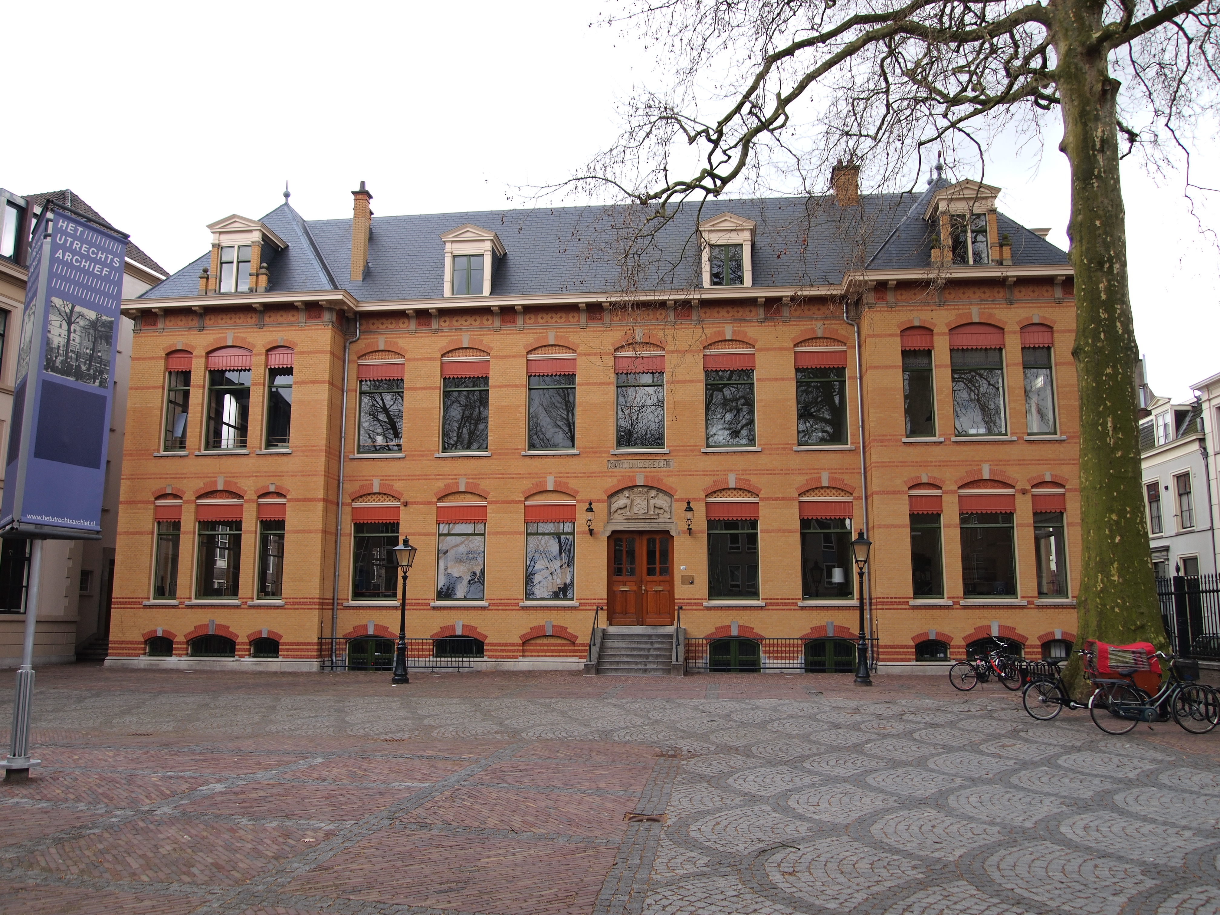 Voormalig kantongerechtsgebouw aan de Hamburgerstraat 30(en 32) te Utrecht uit 1912 naar ontwerp van architect van Justitie W.C. Metselaar